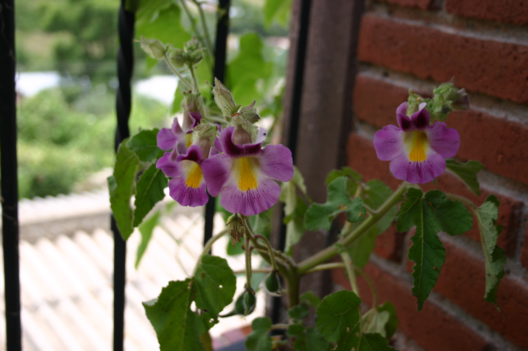 Proboscidea